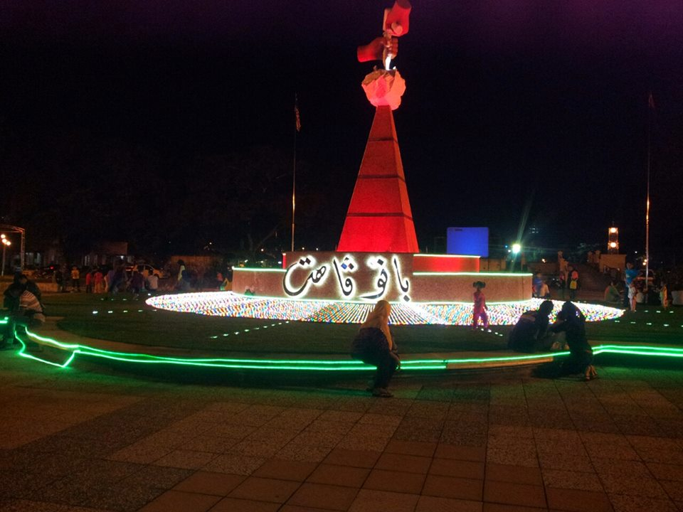 这是一幅摄于马来西亚柔佛州峇株巴辖帆加兰广场的照片